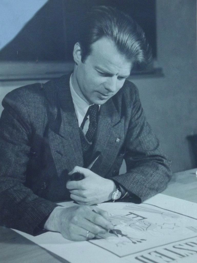 Viggo Guttorm-Pedersen på Teknisk Skole, hvor han underviste i skriftemaling